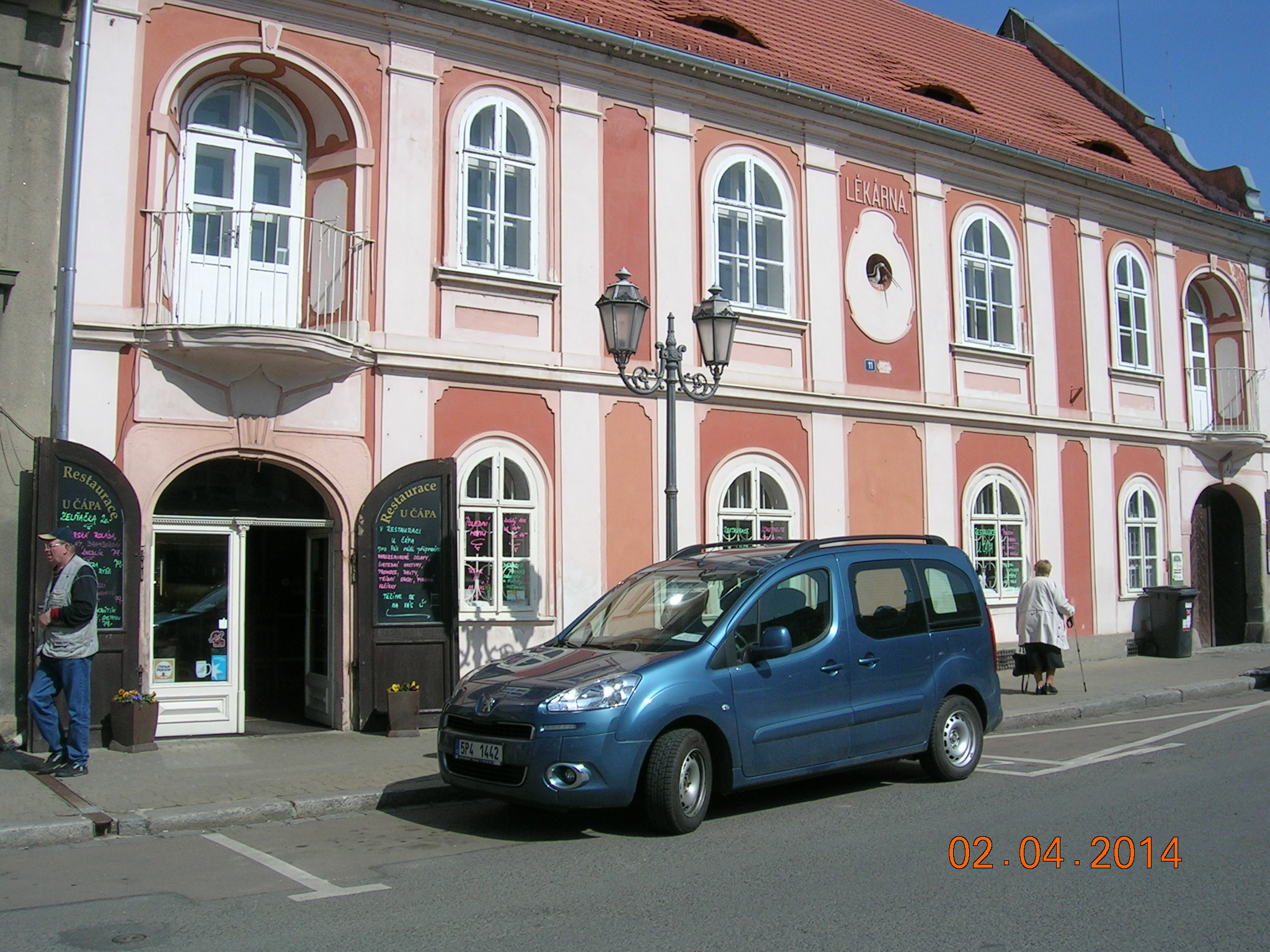 Rokycany, dům U Čápa